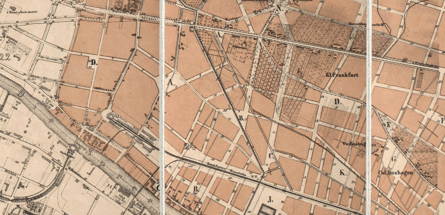 Die Communication zwischen dem Frankfurter Thor und dem Stralauer Thor war nach der Niederlegung der Berliner Zollmauer der Verkehrszug der im Hobrcht-Plan als Straße 9 vorgesehen wurde. 1767 erfolgte die benennung als Memeler Straße. Der Name seit 1950 ist Marchlewskistraße, sie liegt im Berliner Bezirk Friedrichshain-Kreuzberg, Ortsteil Friedrichshain. Der Ausschnitt zeigt den speziellen Verlauf im Gesamtplan von 1863.